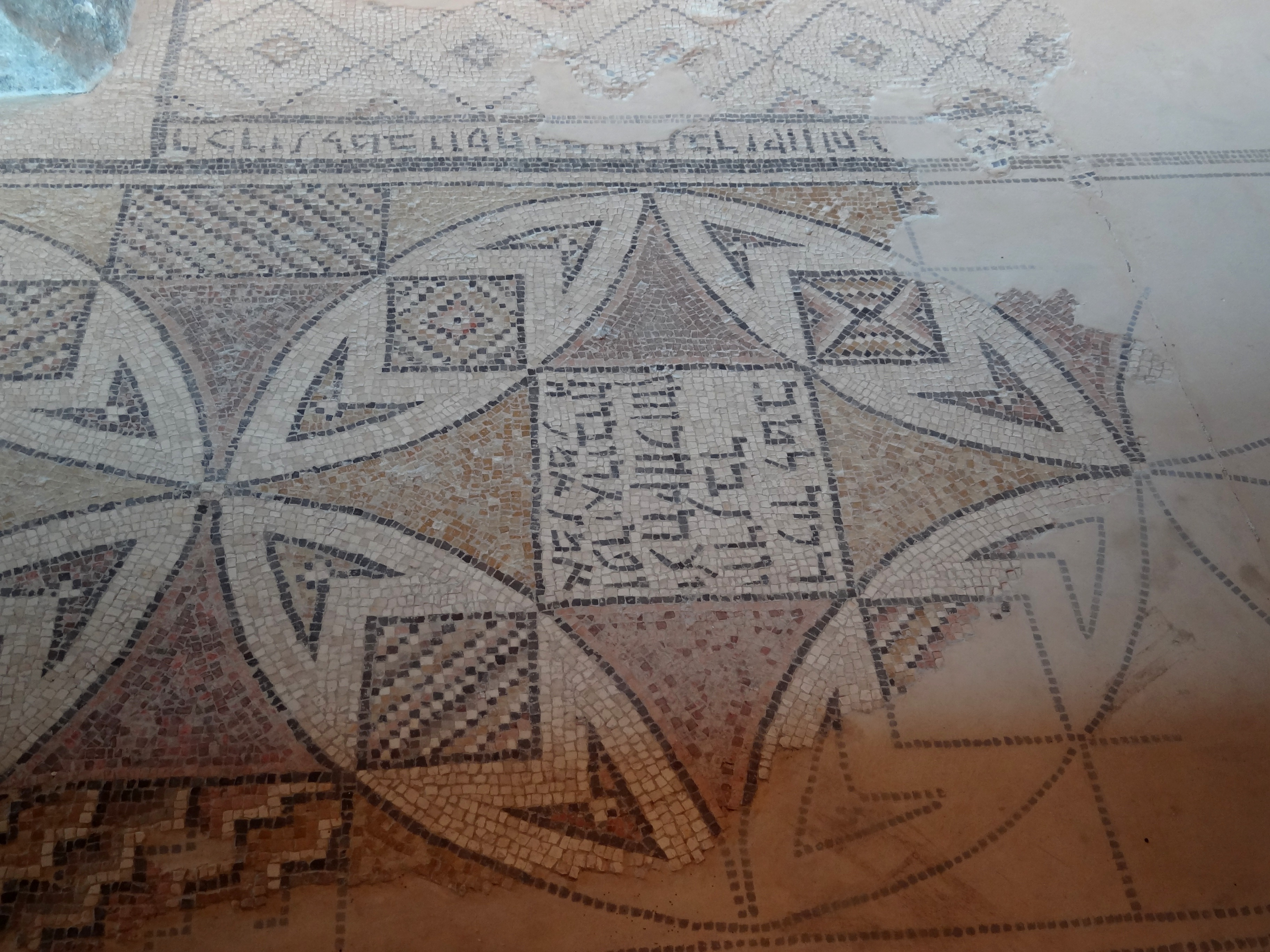 Zippori - The i synagogue בית הכנסת העתיק של ציפורי כתובת בארמית המציינת את התורמים לבית הכנסת דכיר לטב (זכור לטוב) יודן בר יצחק הכוהן ופריגרי ברתה (בתו) אמן אמן